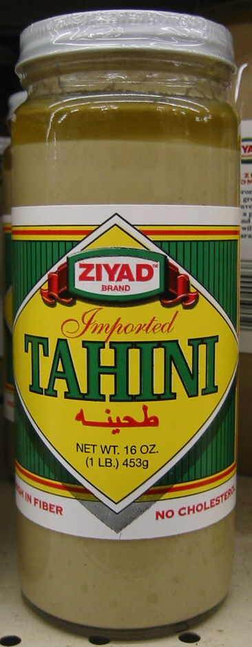 Tahini,طحينية.